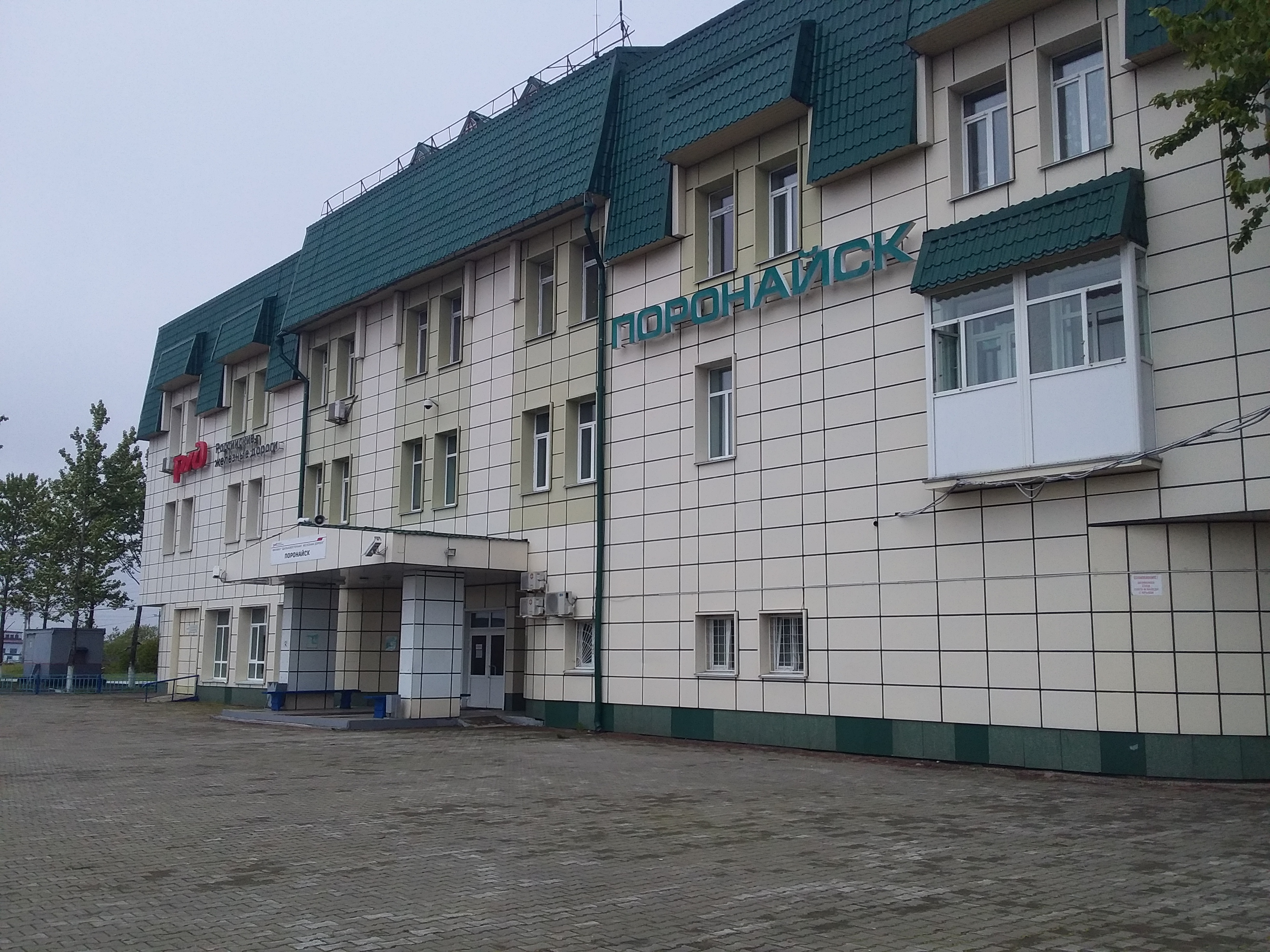 Сахалинский регион ДВЖД, станция Поронайск, со стороны путей